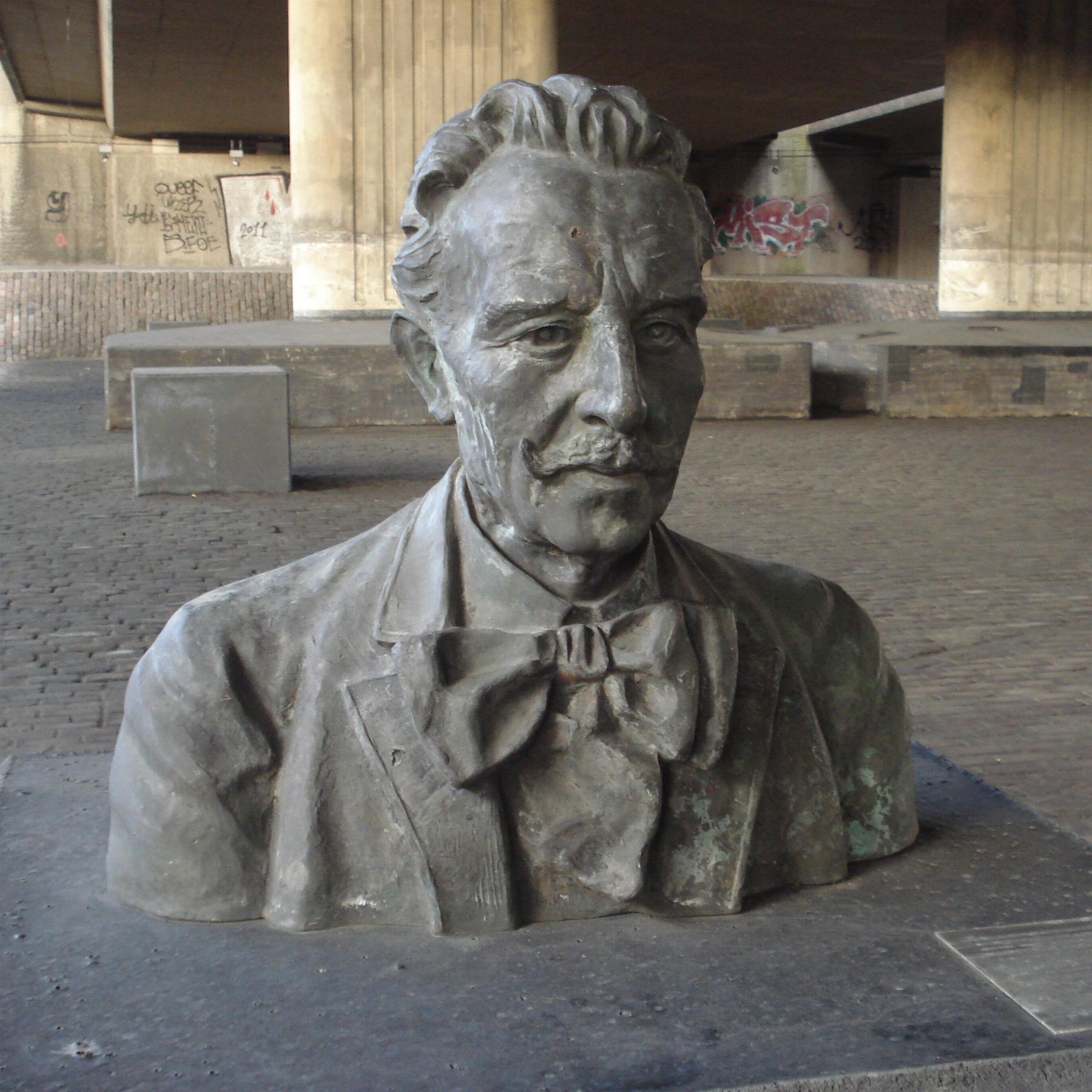 Rotterdam, Kleinpolder, Kleinpolderplein. Kunstwerk "Bernard Diamant" van Han Rehm. The Netherlands. The photographical reproduction of this work is covered under the article 18 of the Dutch copyright law, which states that “it is not an infringement of copyright to reproduce and publish pictures of a work, as meant in article 10, first paragraph, under 6°[1] or of an architectural work as meant in article 10, first paragraph, under 8°[2], which are made to be permanently located in a public place, as long as the work is depicted as it is located in the public space. Where incorporation of a work in a compilation is concerned, not more than a few of the works of the same author may be included”. [1] drawings, paintings, works of architecture and sculpture, lithographs, engravings and the likes [2] drafts, sketches and three-dimensional works relating to architecture, geography, topography or other sciences Note that photographs are not included in Item 6. They are separately listed at Item 9 and are therefore not covered by FOP. See COM:CRT/Netherlands#Freedom of panorama for more information. .